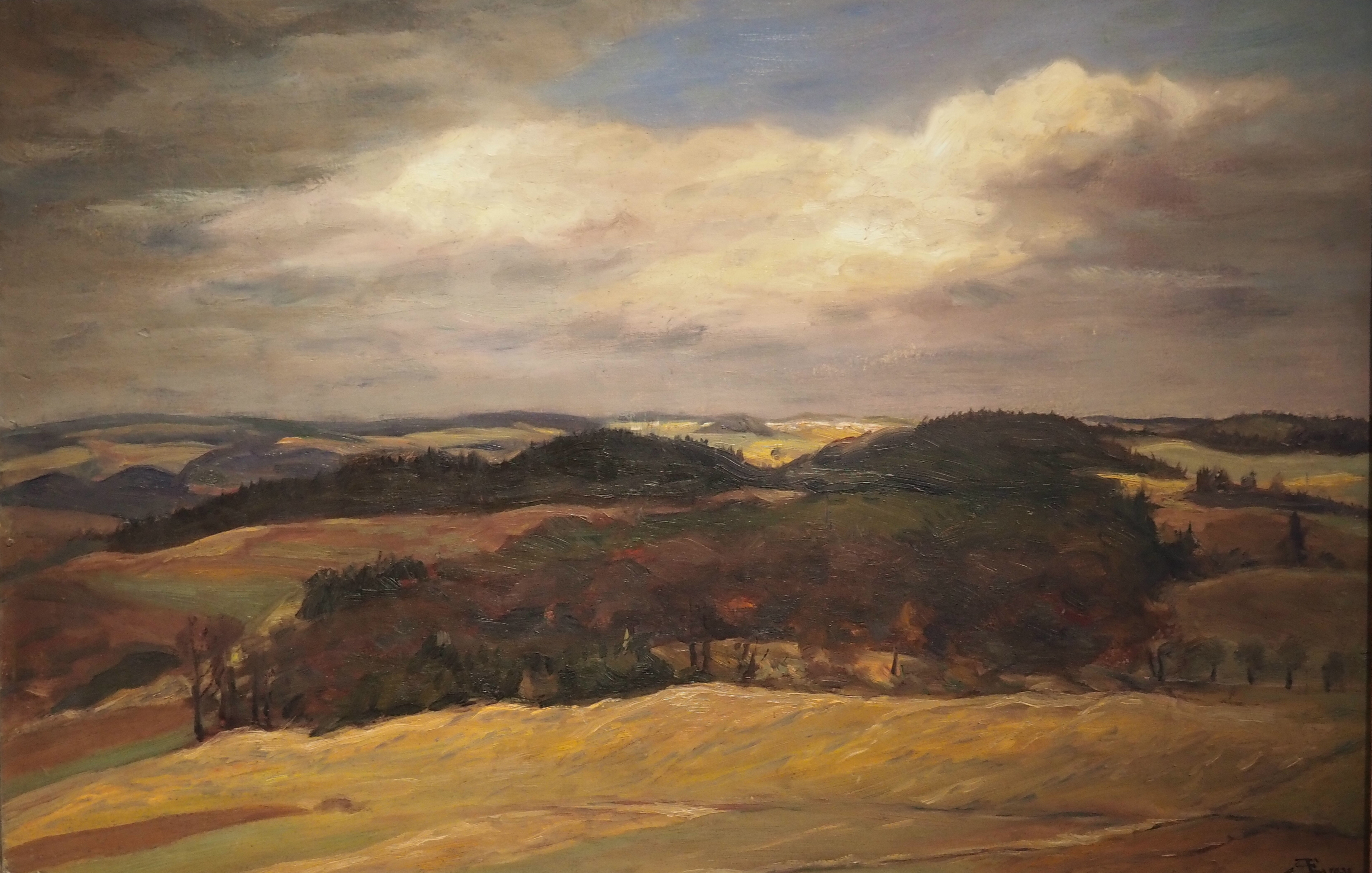 Vogtländische Märzlandschaft, Öl auf Pappe